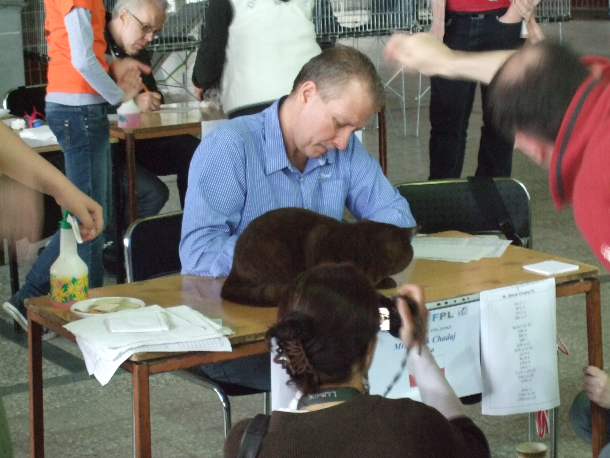 Międzynarodowa Wystawa Kotów Rasowych w Chorzowie.